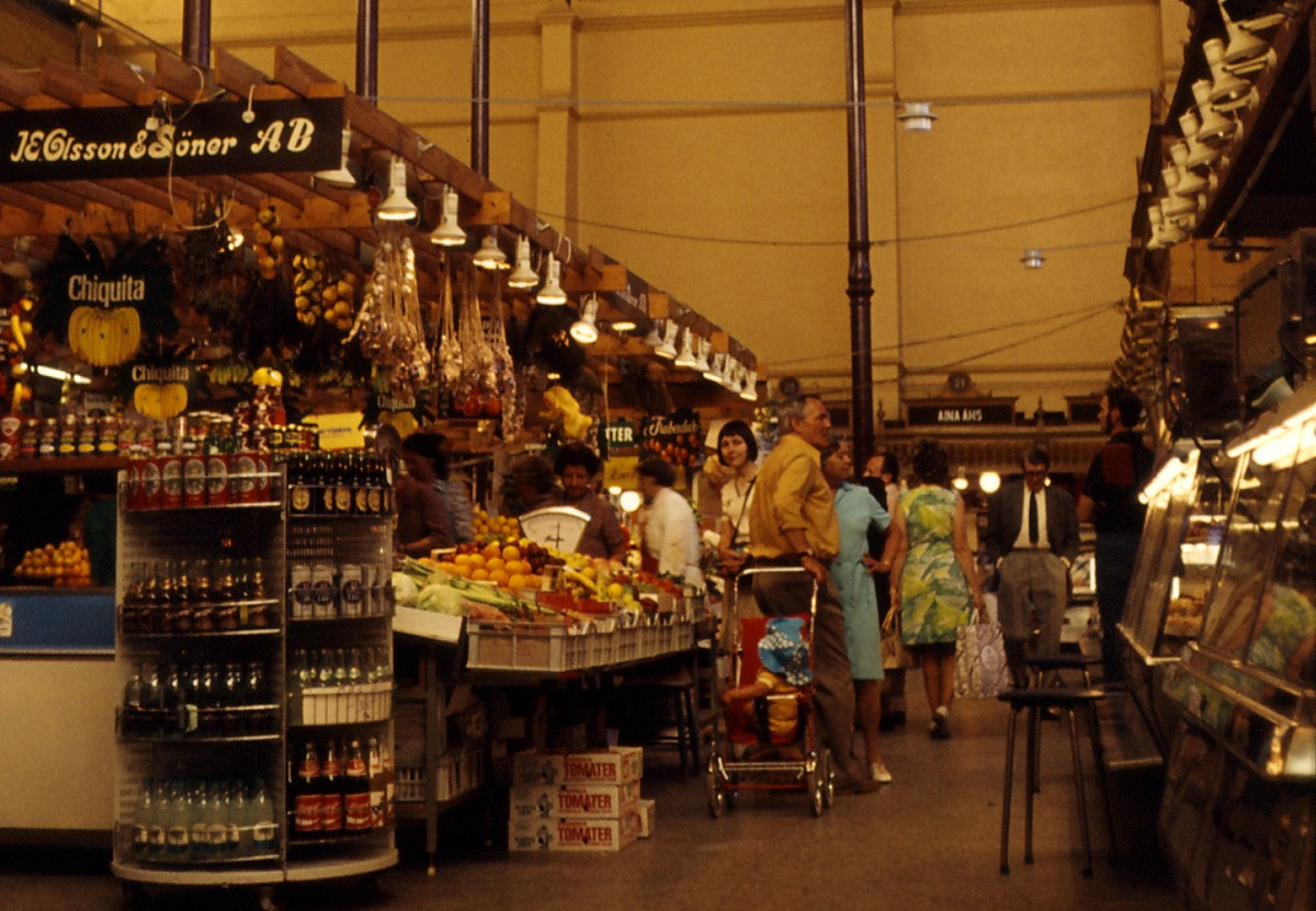 Östermalms Saluhall 1975